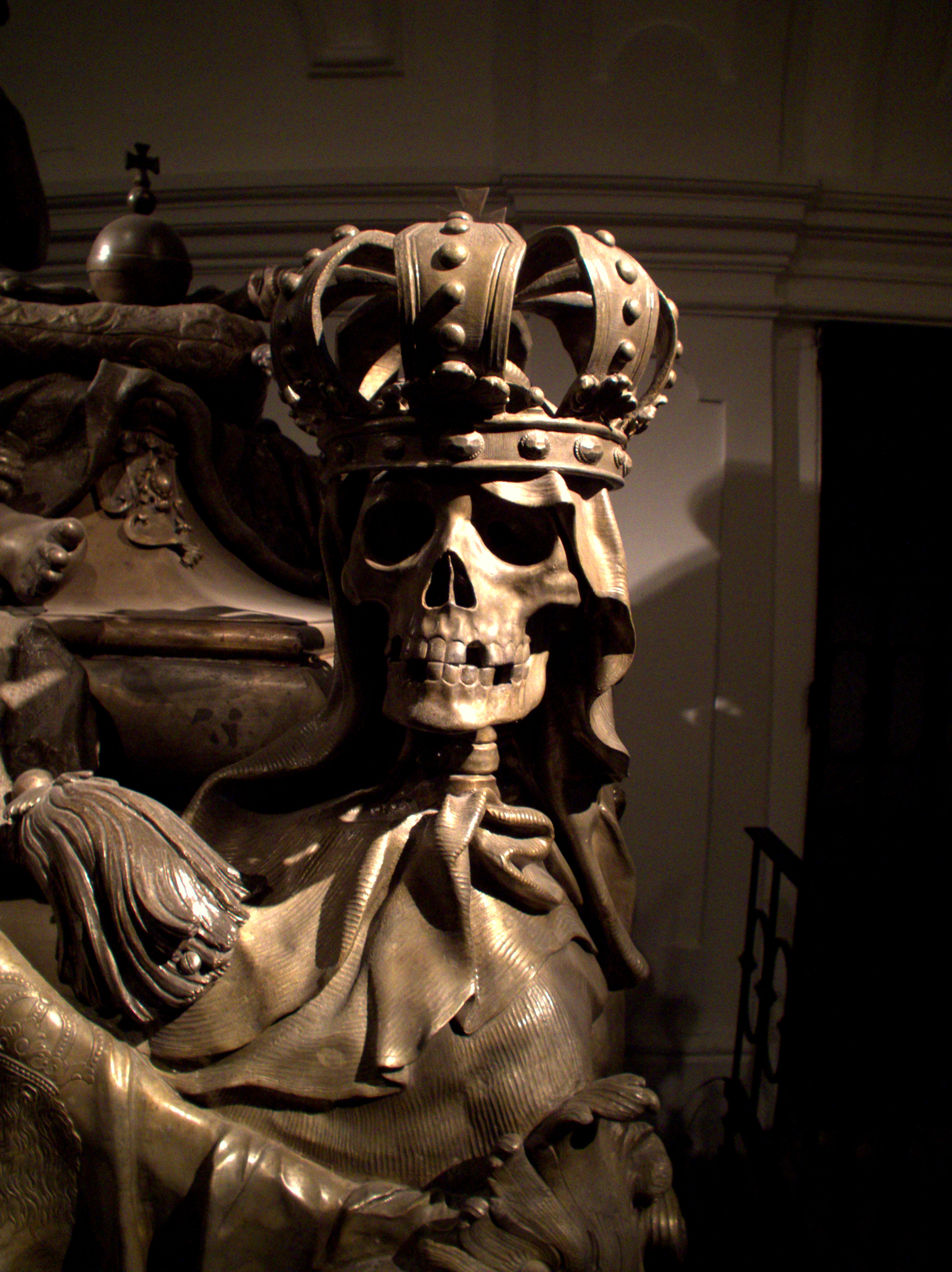 Kapuzinergruft Wien, Grablege des Hauses Habsburg